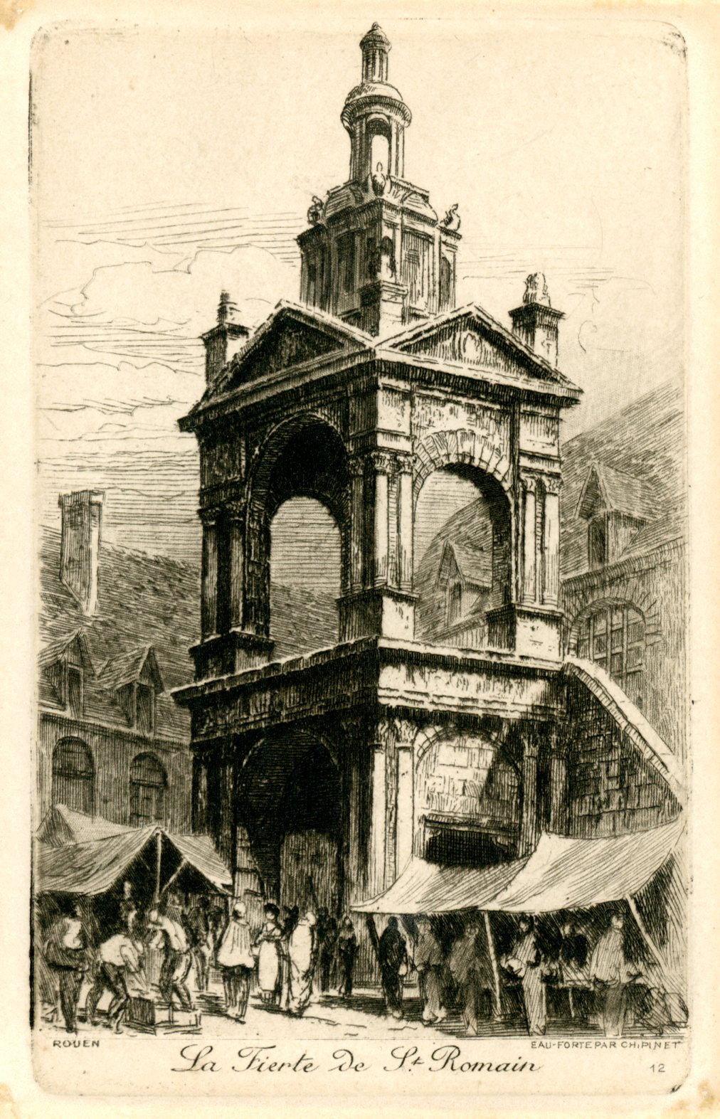 Rouen, La Fierte de Saint-Romain - eau-forte de Charles Pinet (série Rouen n° 12) - fierte sans accent, « Fierte est un mot d'ancien français signifiant châsse, issu du latin feretrum « brancard, civière pour les morts »